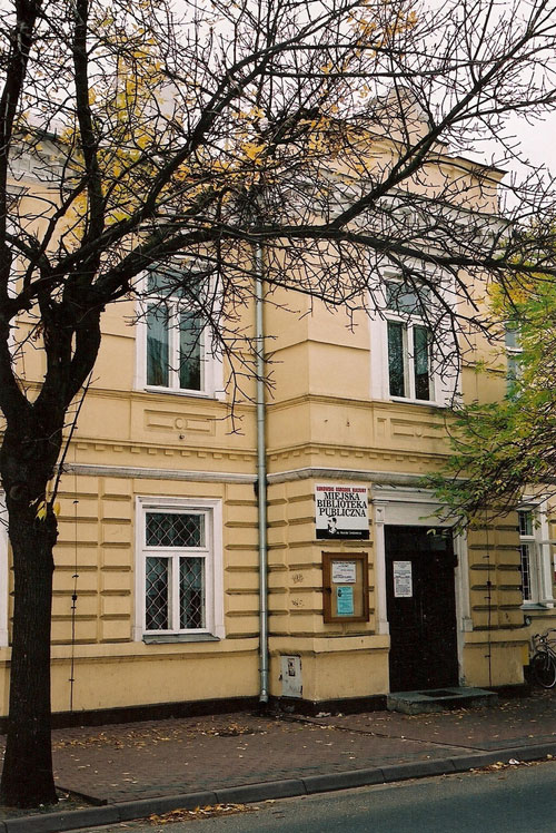 Budynek Miejskiej Biblioteki Publicznej im. Henryka Sienkiewicza w Łukowie